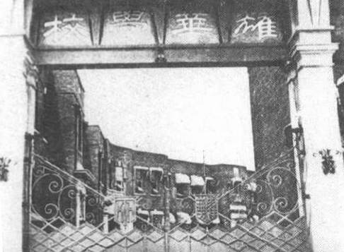 耀华学校校门老照片